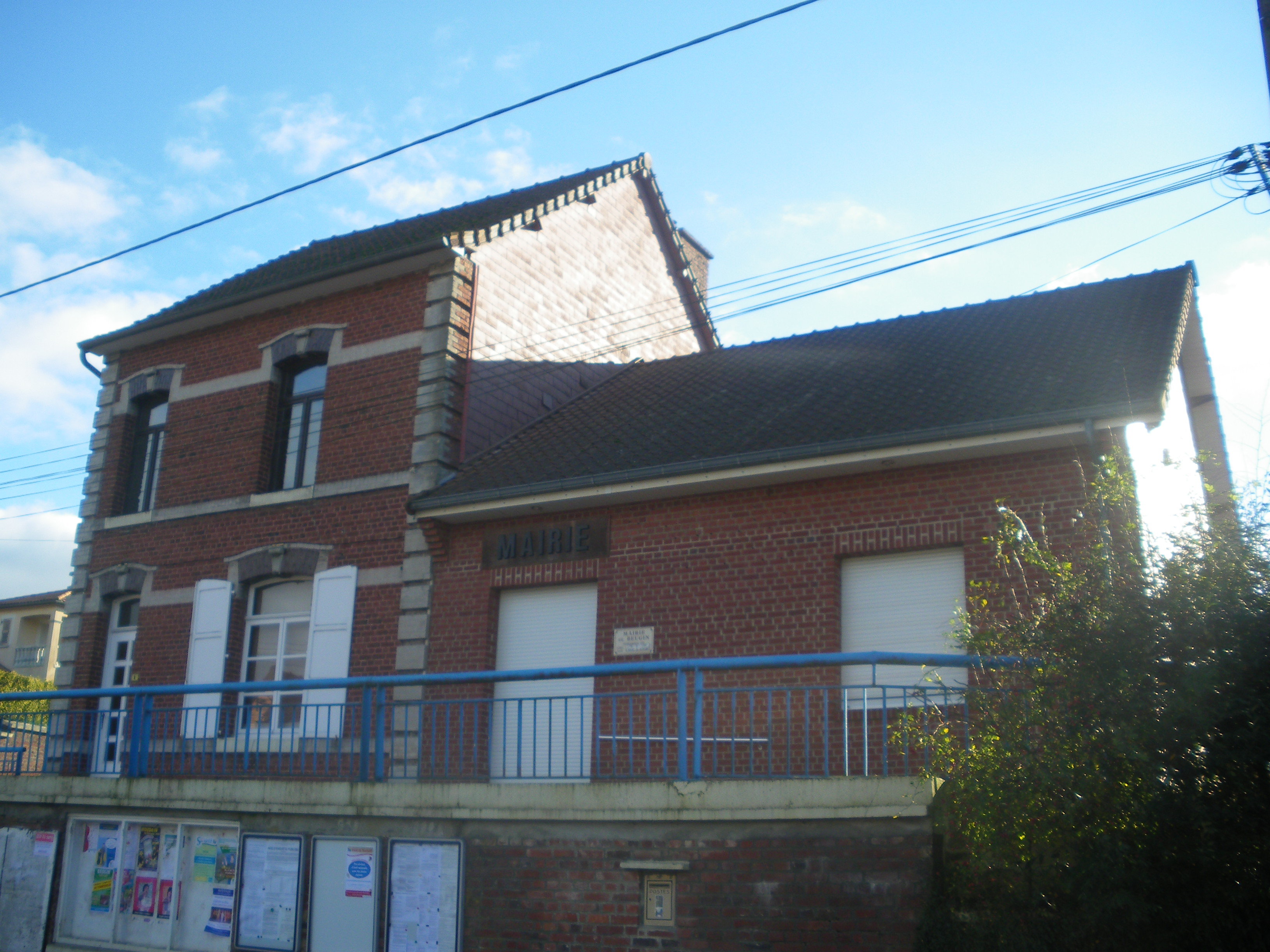 Vue de la mairie de Beugin.